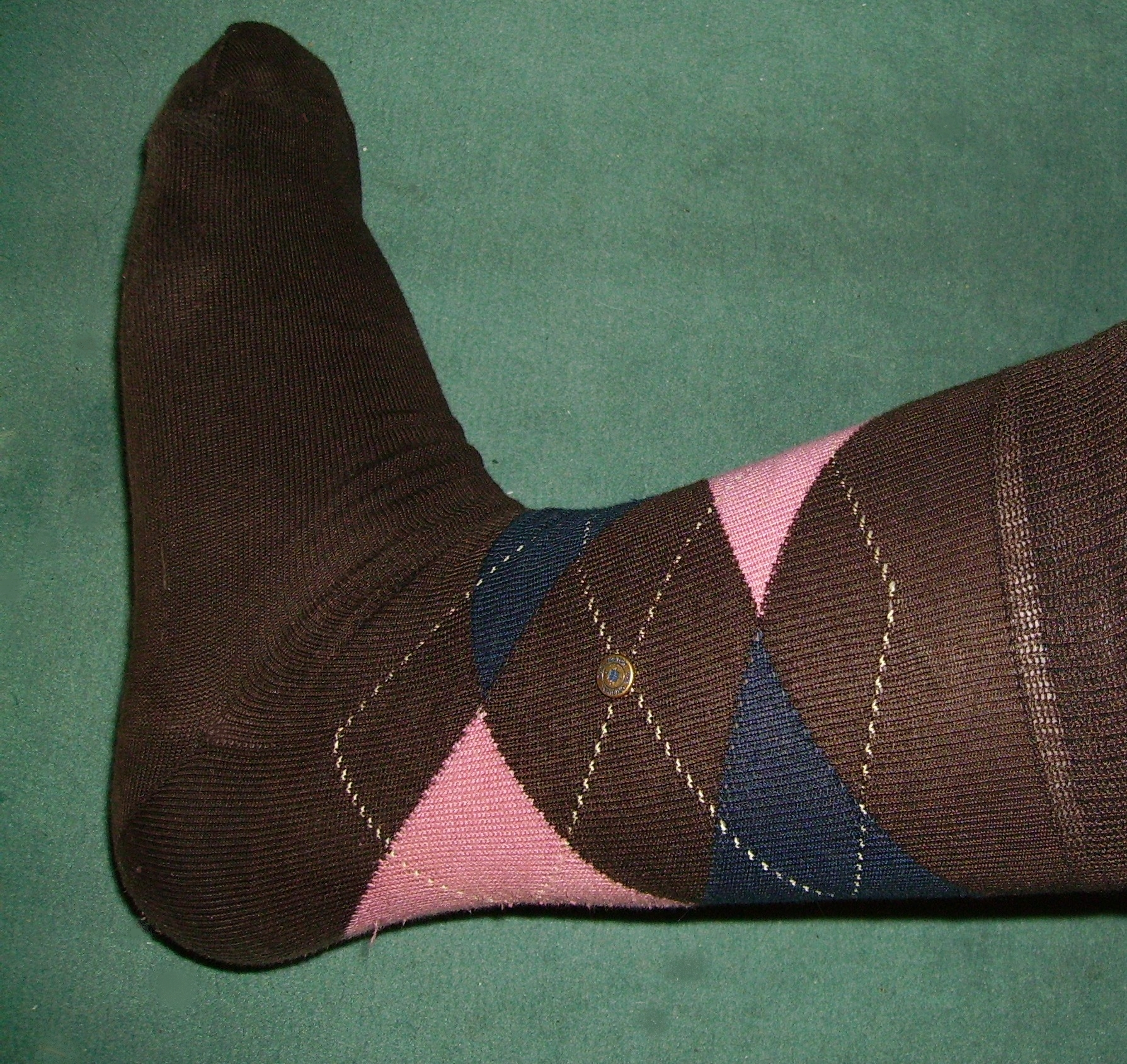 Une des célèbres chaussettes Burlington